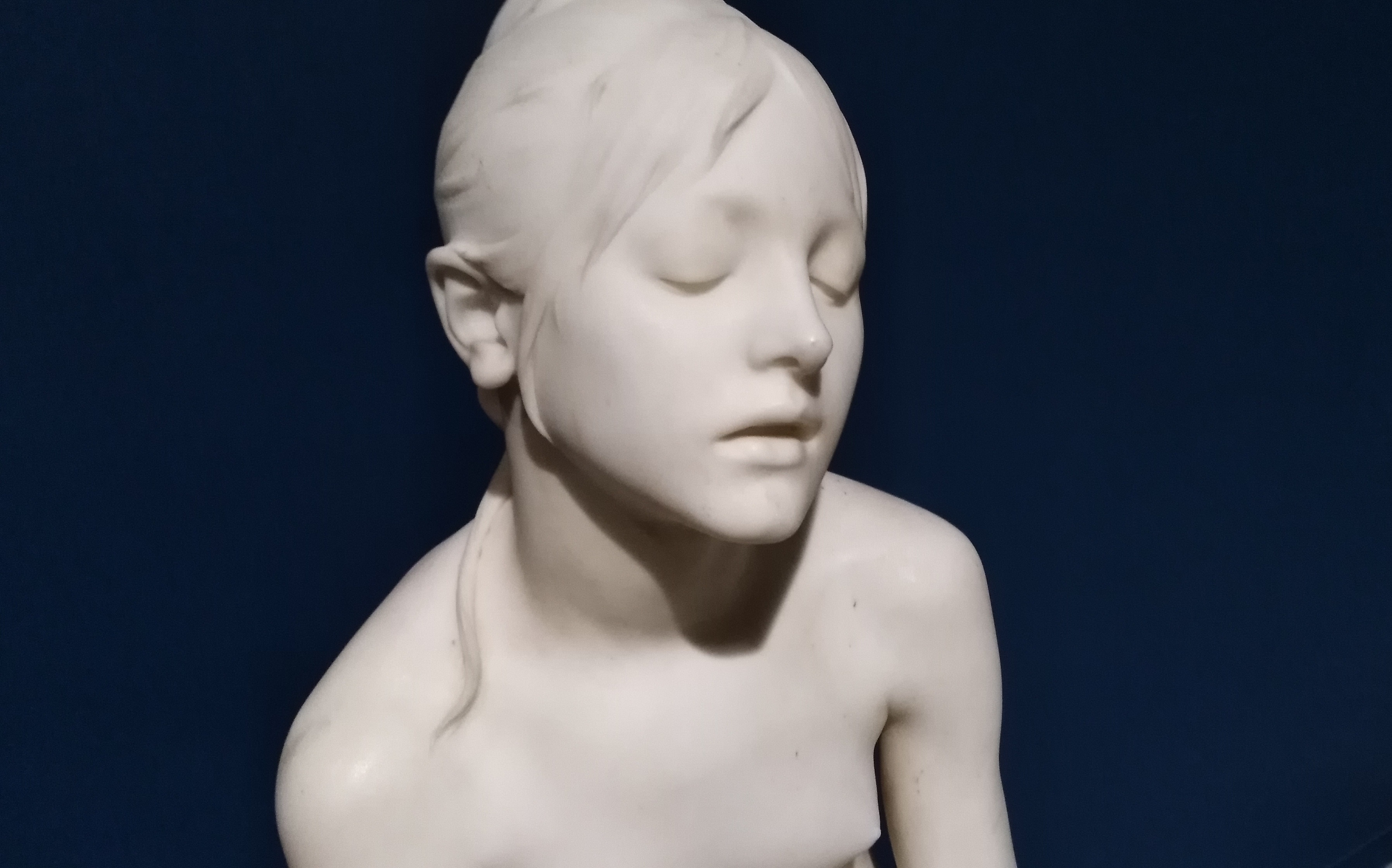 Julien Dillens (1849–1904) Figure tombale/Graaffigur